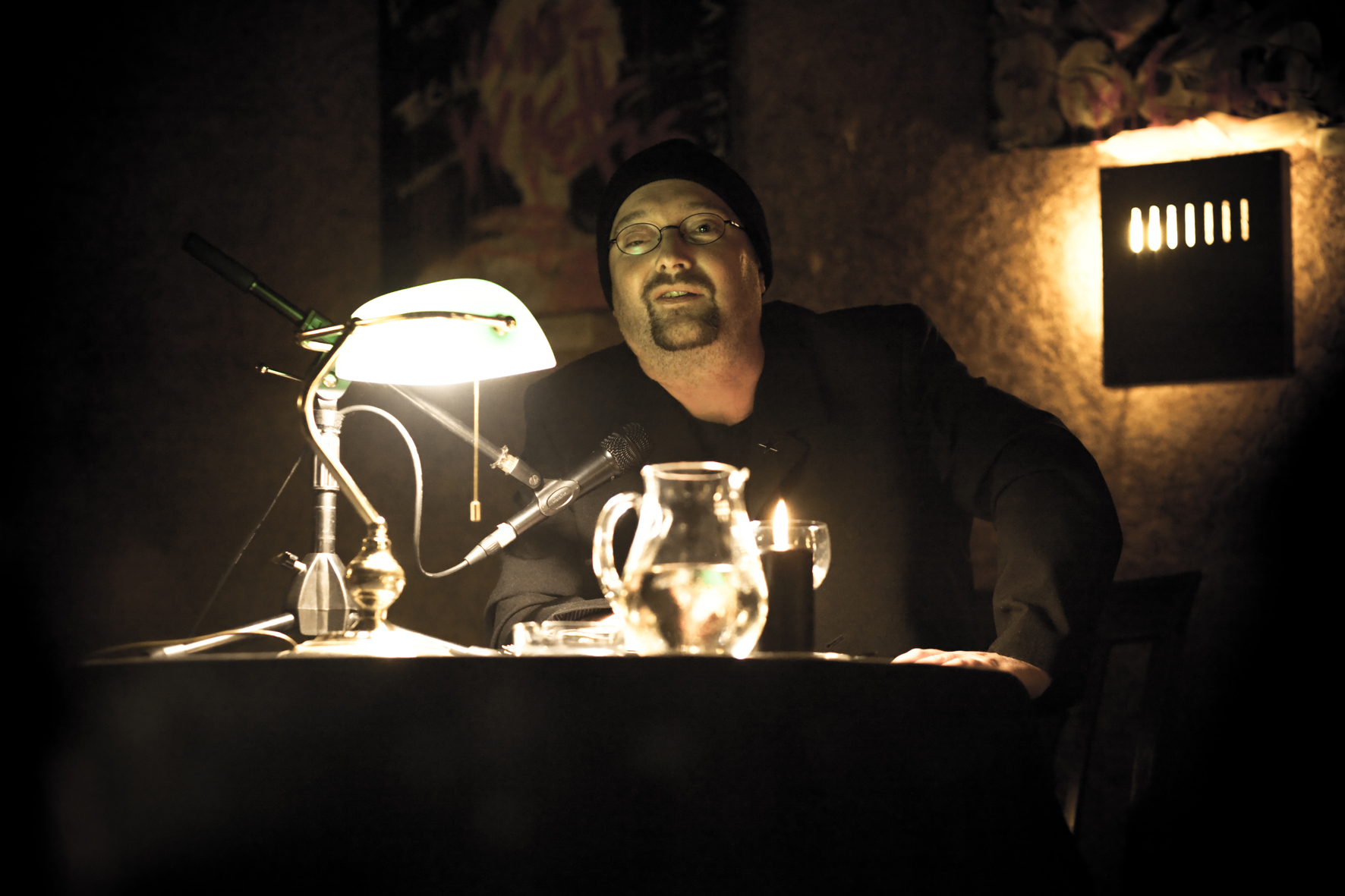 Volly Tanner bei einer Lesung